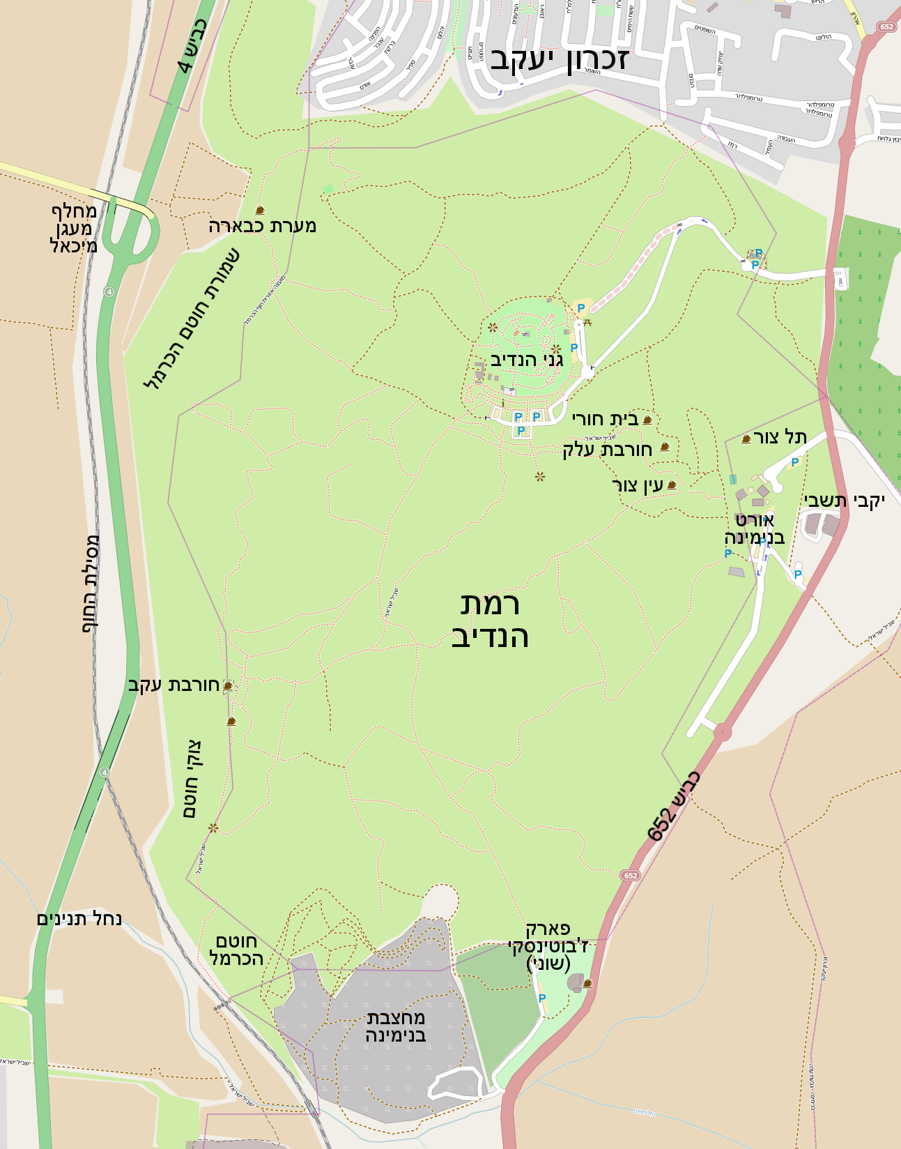 Ramat HaNadiv